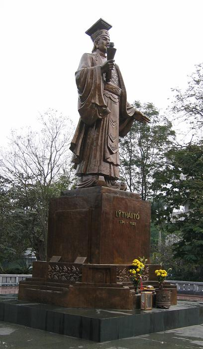 Lý Thái Tổ, vietnamski vladar; spomenik v Hanoju. izdelal: --Ziga 18:38, 4 februar 2006 (CET)